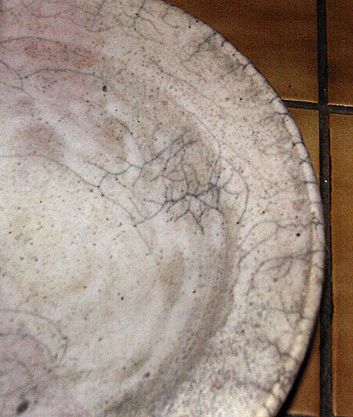 Raku Krakelee Ausschnitt, überschärft